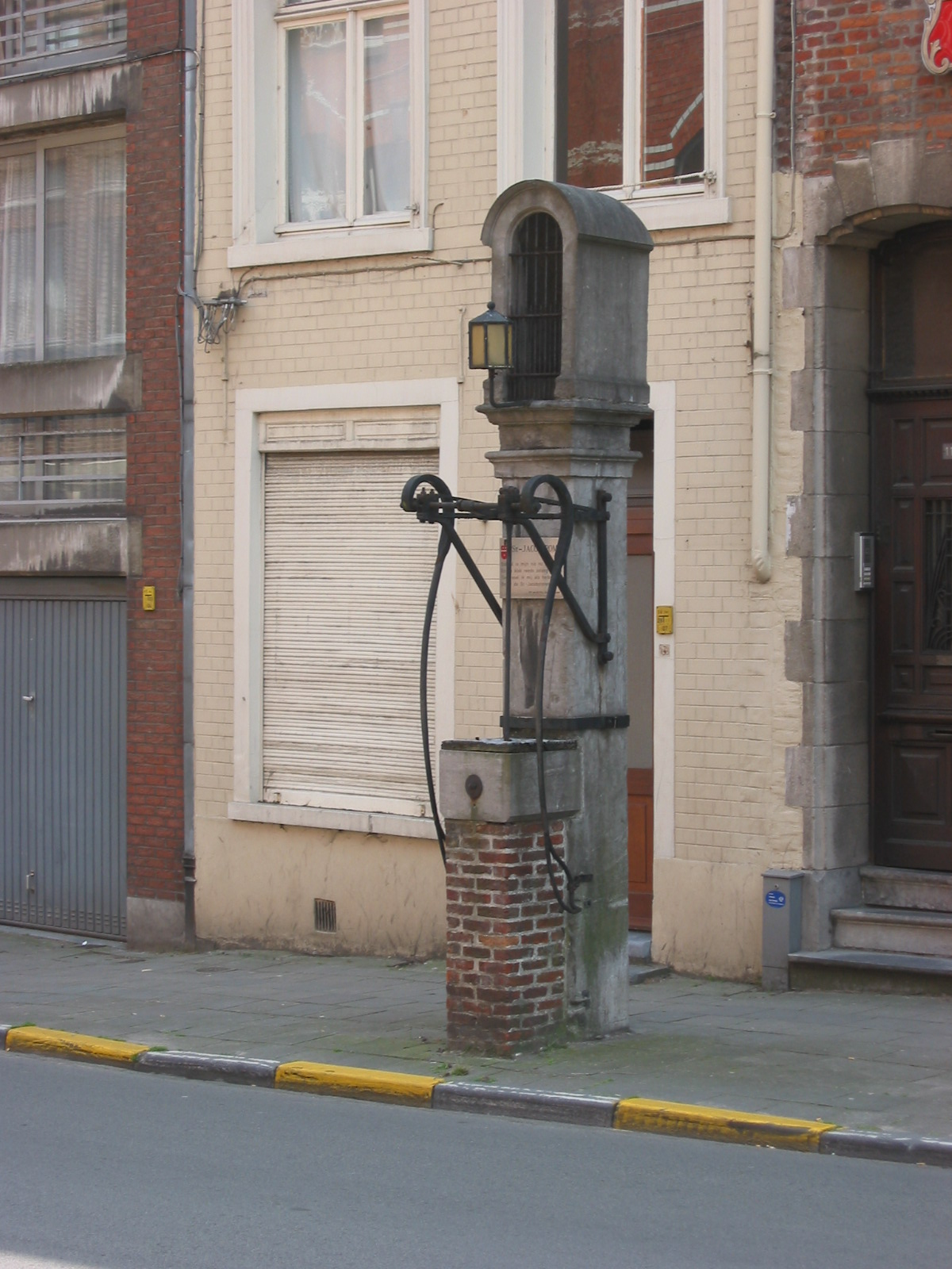 Een van de pompen die Leuven nog rest. Deze staat vlakbij de Sint-Jacobskerk, daarom heet ze ook Sint-Jacobspomp. (Gemaakt in juni 2006)